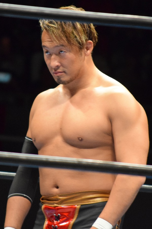 2016年8月6日 大阪府立体育会館 「G1 CLIMAX 26」 丸藤正道